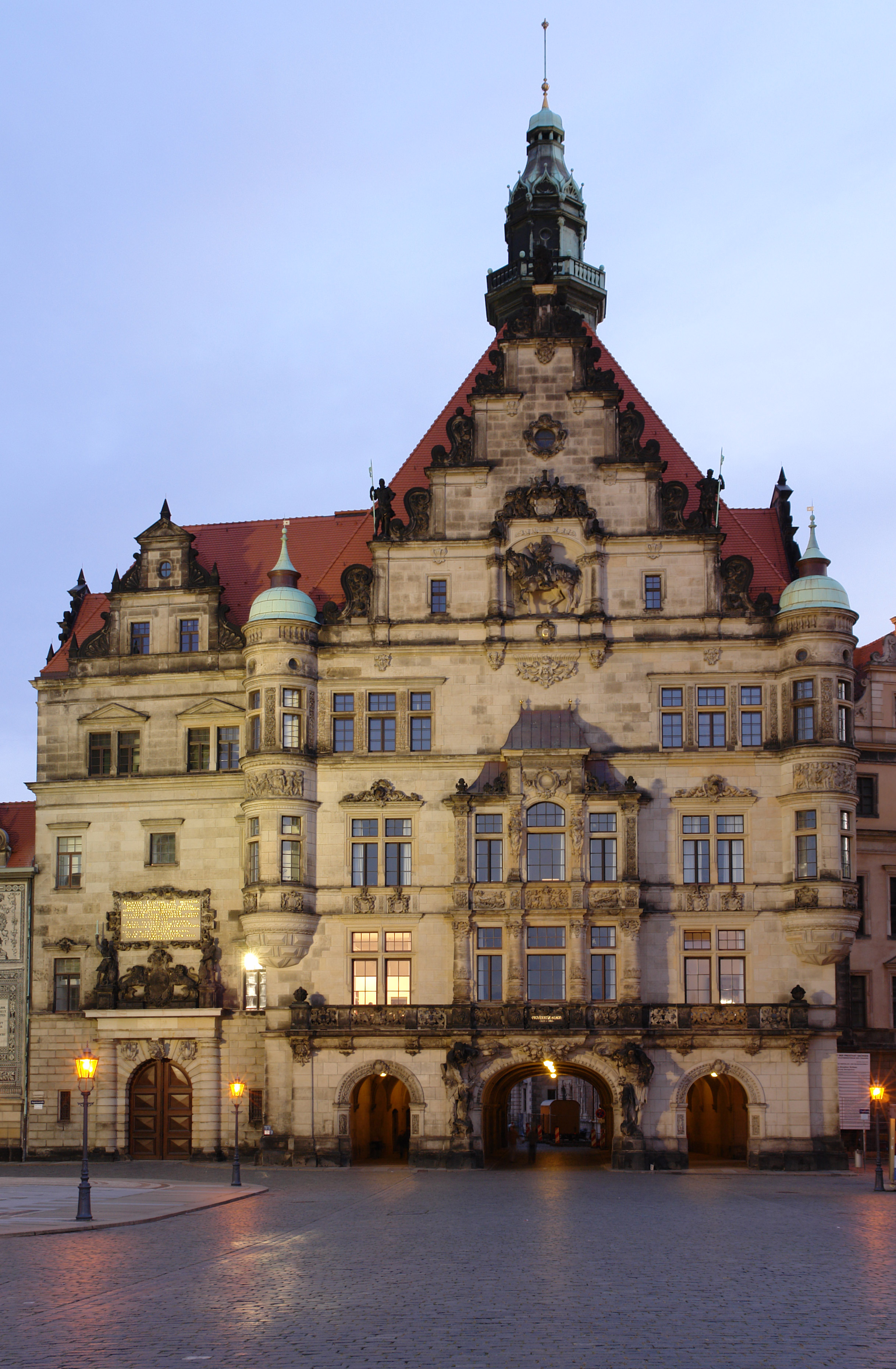 Georgenbau in Dresden während der Dämmerung